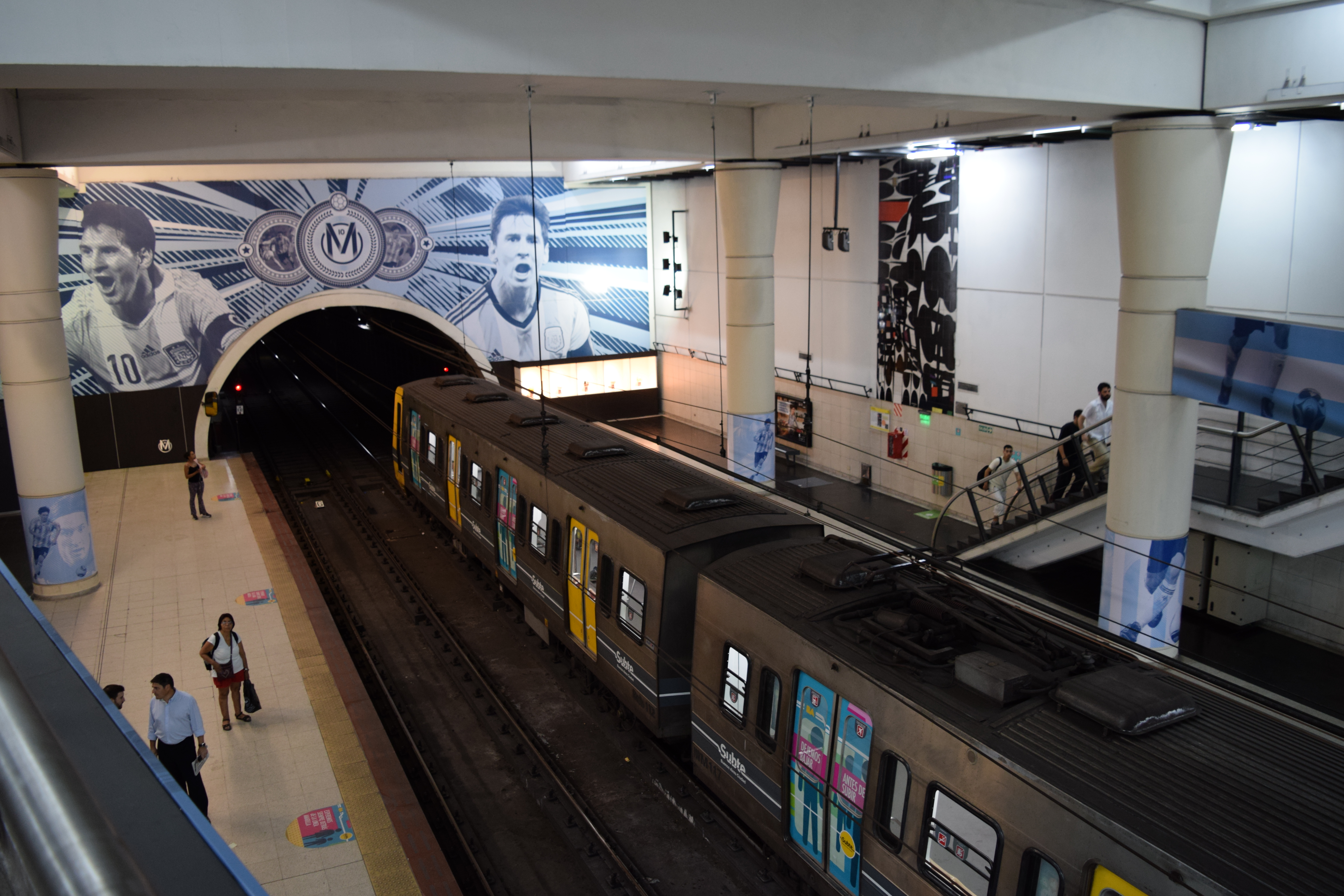 Tren con destino a Catedral en la estación José Hernández de la Línea D del Subte de Buenos Aires.